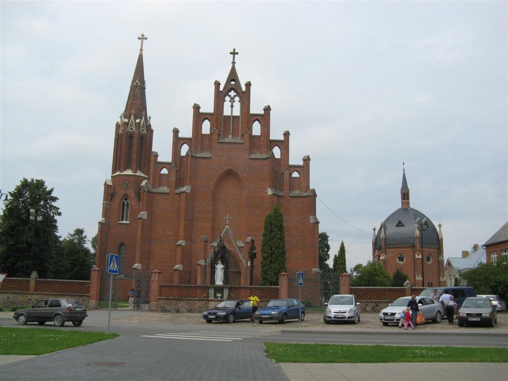 Rokiškio Šv. apaštalo evangelisto Mato bažnyčia